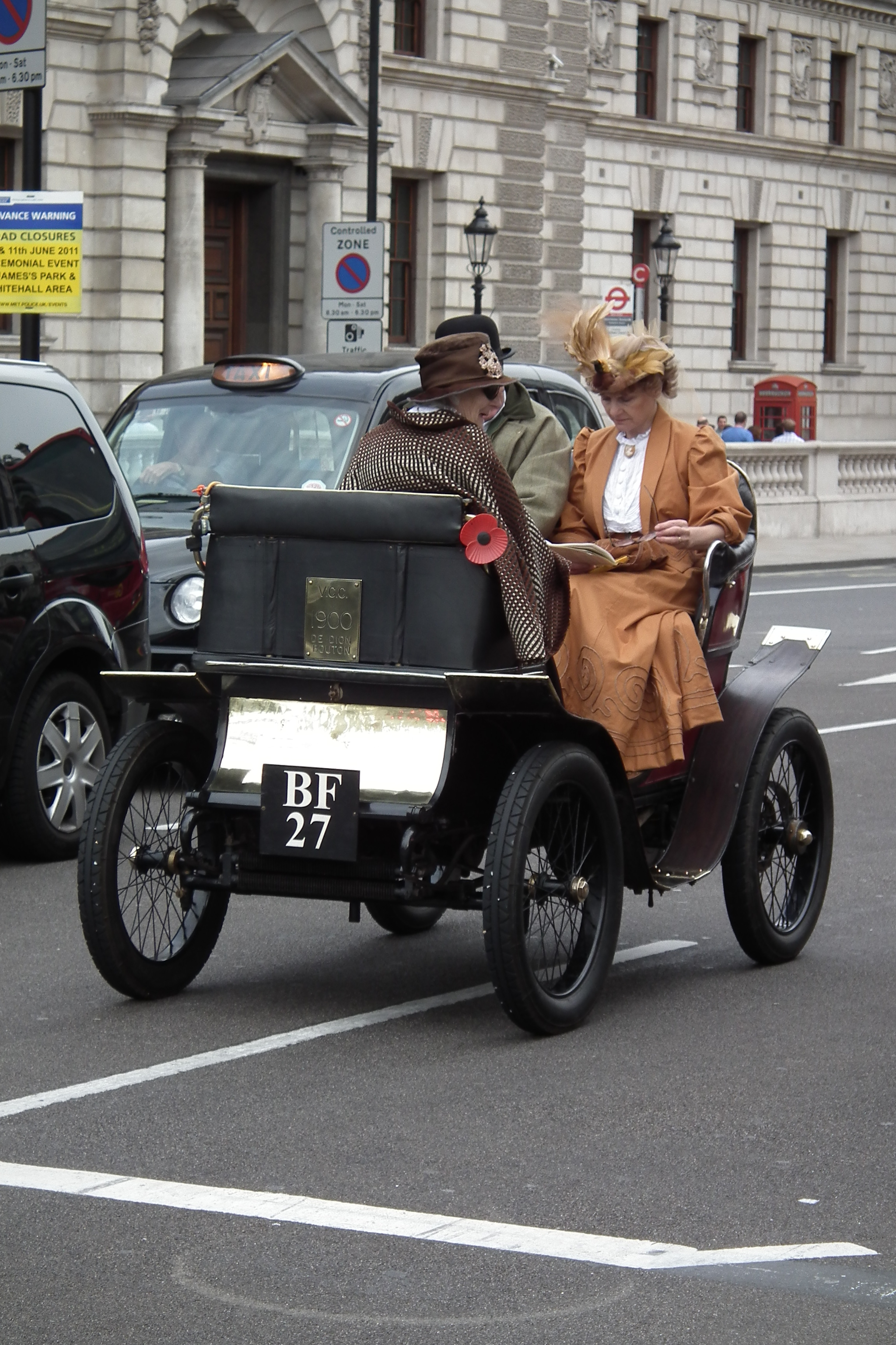 1900 De Dion Bouton. Taken in London.